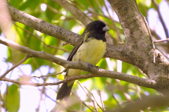 Grenada